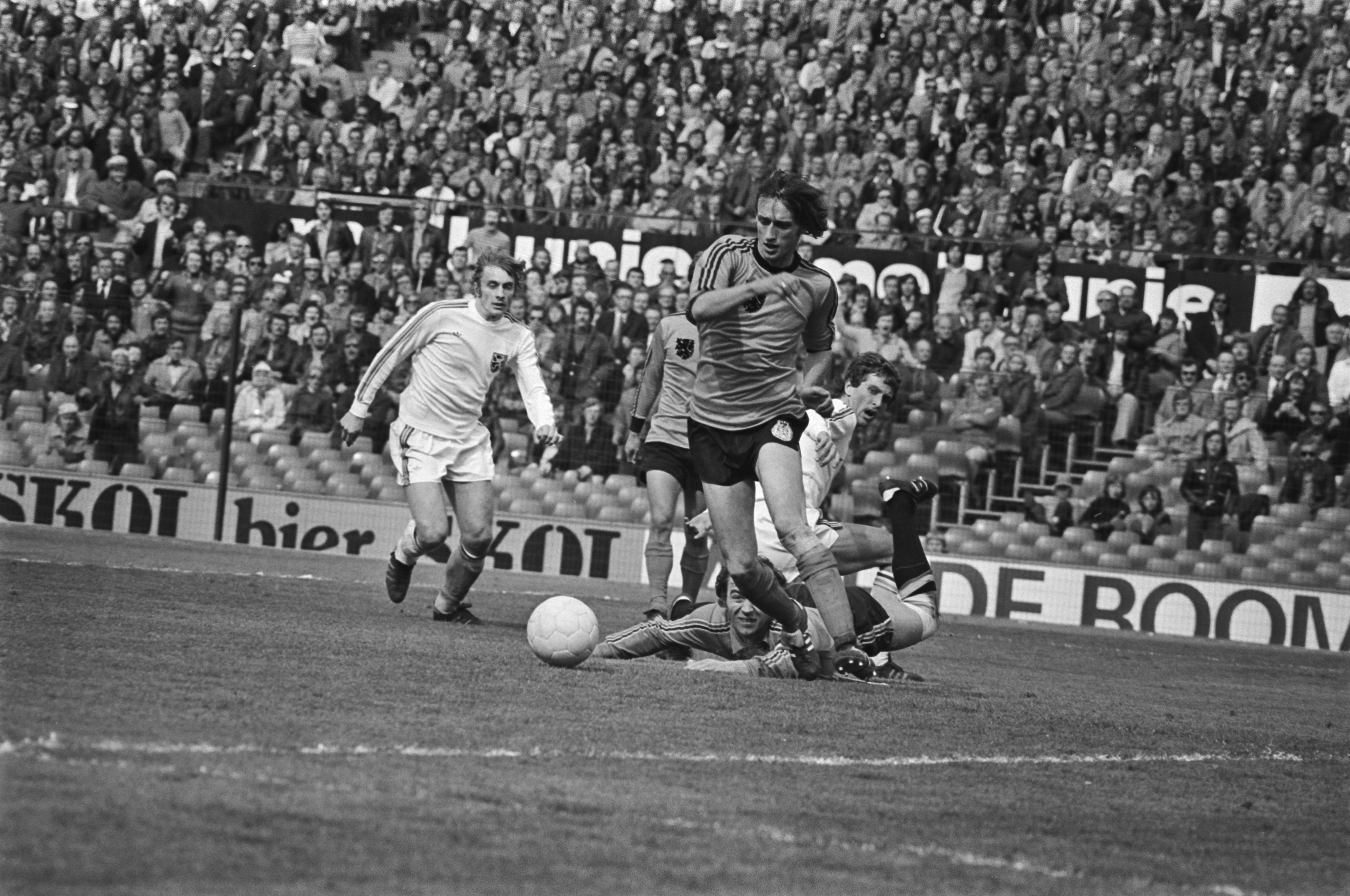 Collectie / Archief : Fotocollectie Anefo Reportage / Serie : [ onbekend ] Beschrijving : Nederland tegen Belgie 5-0; Rensenbrink omspeelt Piot en scoort 3-0 Datum : 25 april 1976 Locatie : België, Nederland Trefwoorden : sport, voetbal Fotograaf : Verhoeff, Bert / Anefo Auteursrechthebbende : Nationaal Archief Materiaalsoort : Negatief (zwart/wit) Nummer archiefinventaris : bekijk toegang 2.24.01.05 Bestanddeelnummer : 928-5398